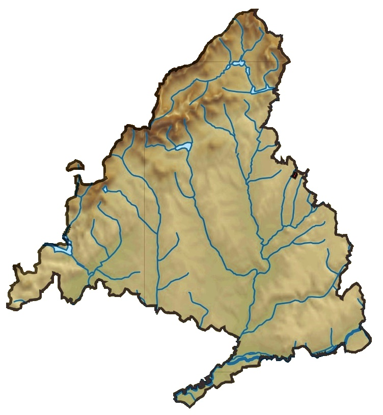 Mapa de la provincia de la Comunidad de Madrid, España.